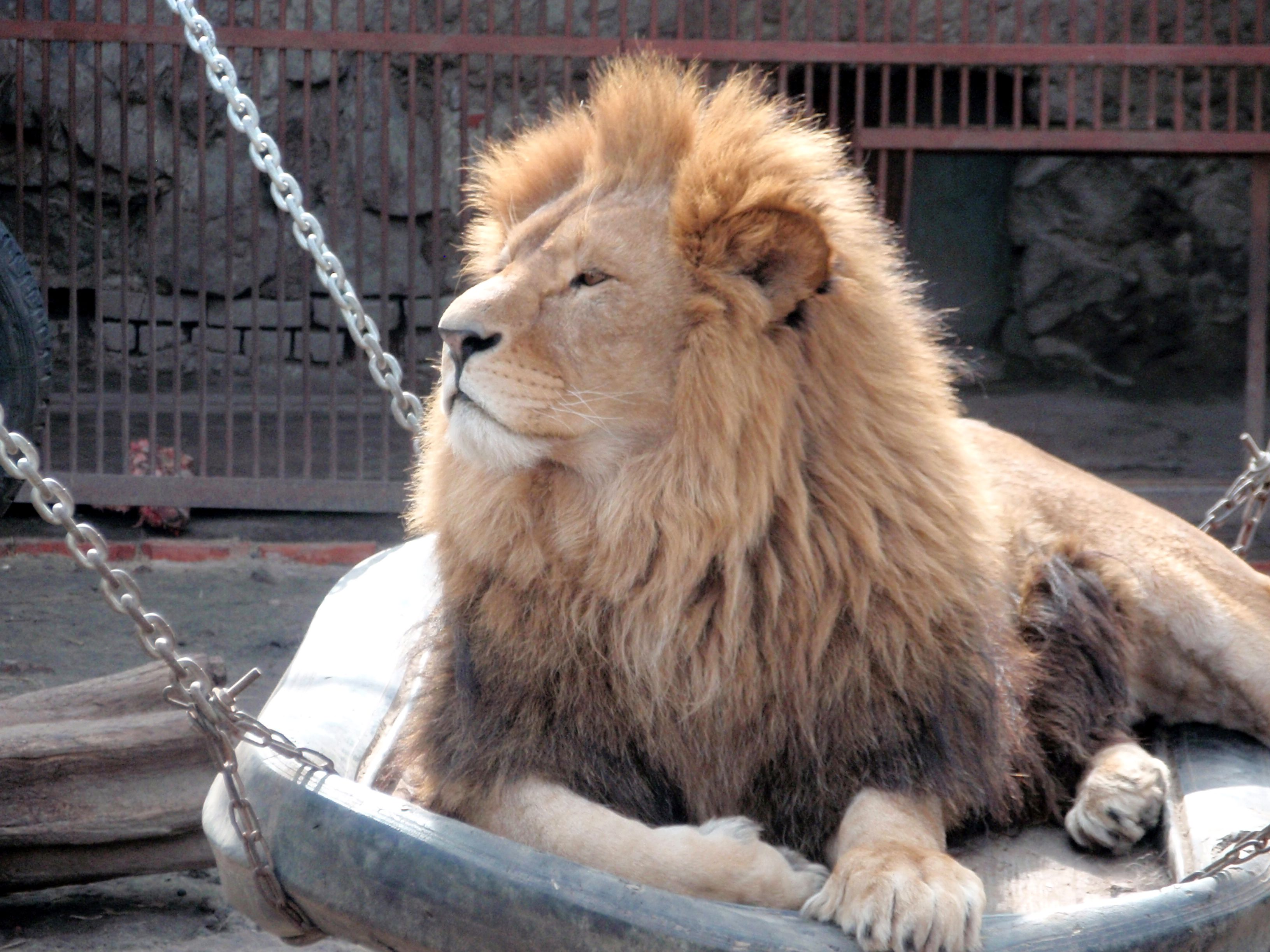 Харківський зоопарк, м. Харків, вул. Сумська, 35